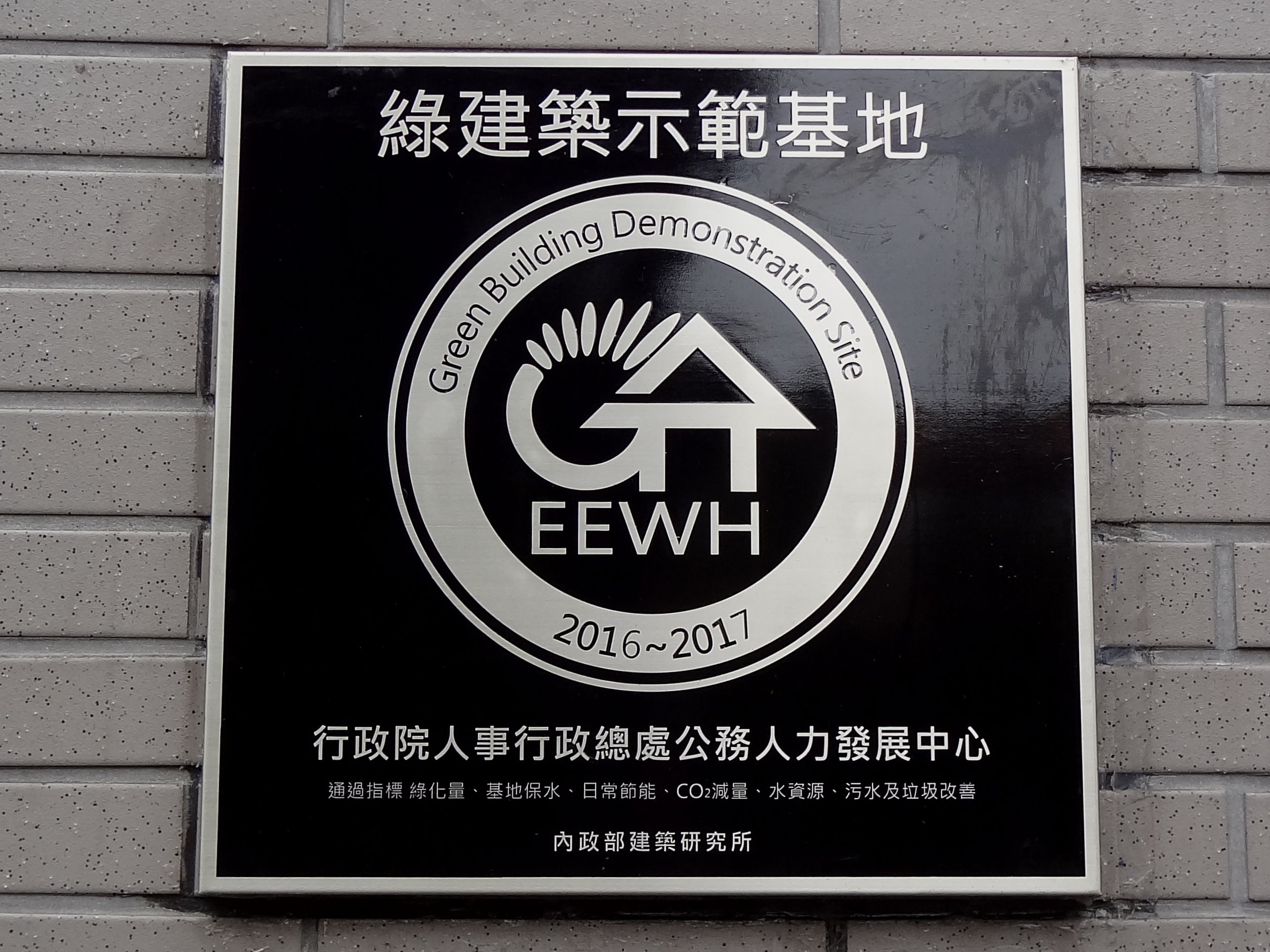 中華民國行政院人事行政總處公務人力發展中心懸掛的內政部建築研究所綠建築示範基地銘板。